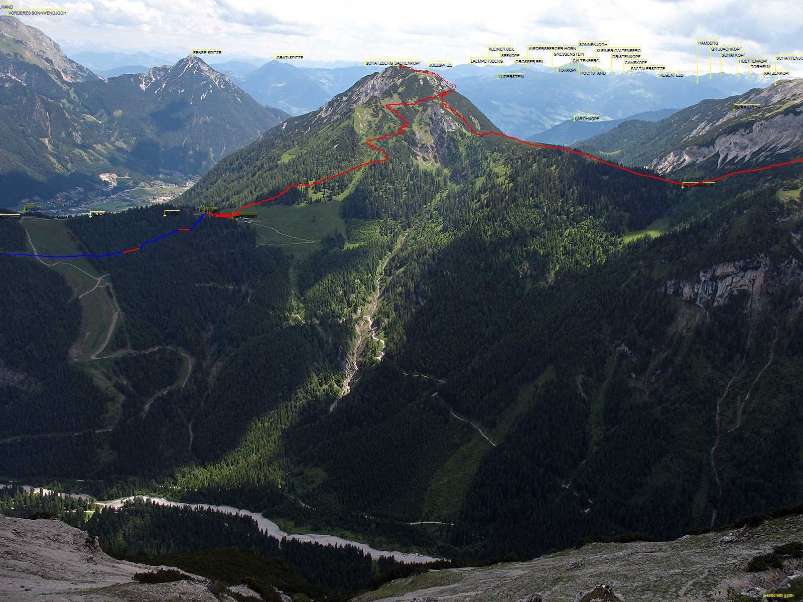 Bärenkopf (Karwendel)